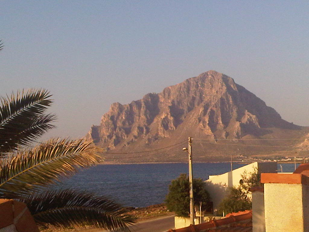 Monte Cofano, Trapani, Italy